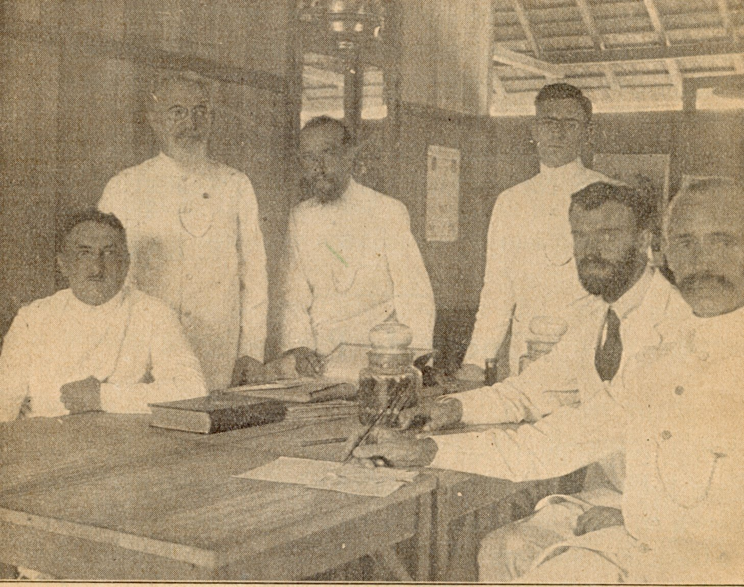 Zendelingen op Soemba. Van links naar rechts: Ds. Lodewijk P. Krijger, Ds. C. de Bruijn, ds. W. van Dijk, ds. J.P. Lambooy, T. Mobach en ds. J.F. Colenbrander. Ds. (zendeling) C. de Bruijn (hij was oorspronkelijk textielhandelaar) was afkomstig uit Hazerswoude. In de jaren dertig van de vorige eeuw werd hij benoemd tot Officier van Oranje Nassau. Zijn onderscheiding behoort nu tot de collectie van het Historisch Museum Hazerswoude. (Aanvulling C. Kroon, Hazerswoude).